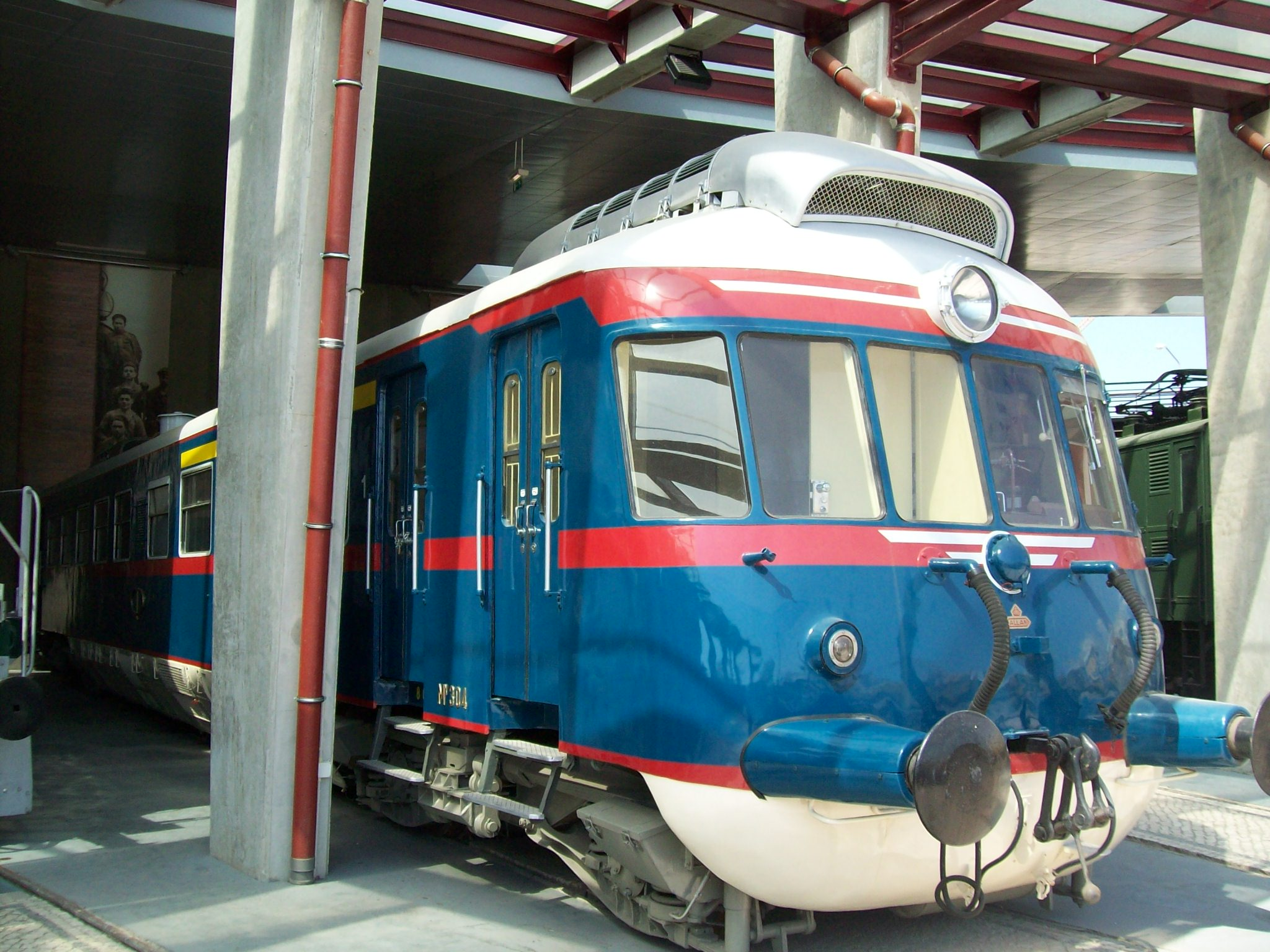 Exemplar do museu do comboio no Entroncamento